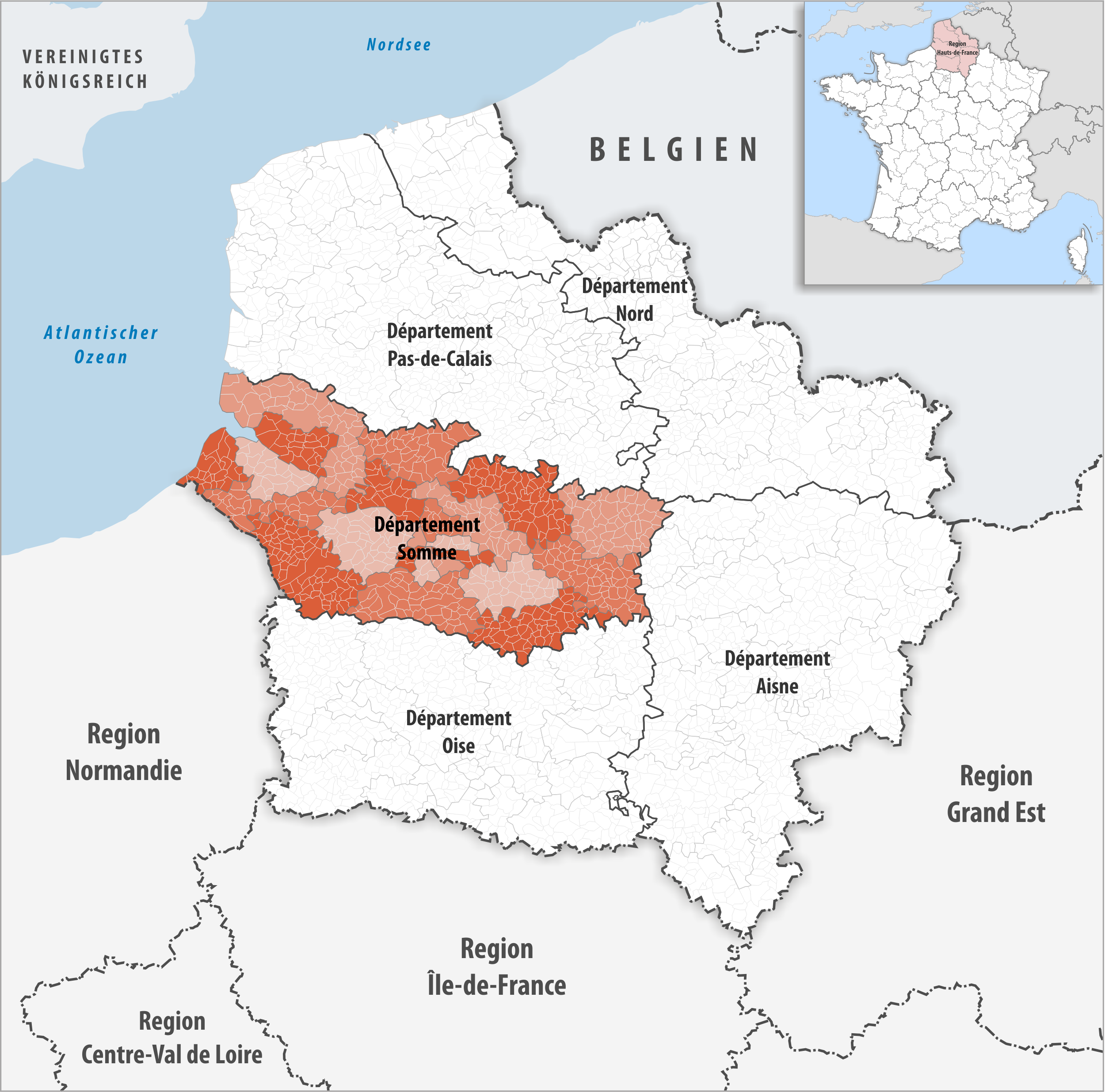 Lage des Departements Somme